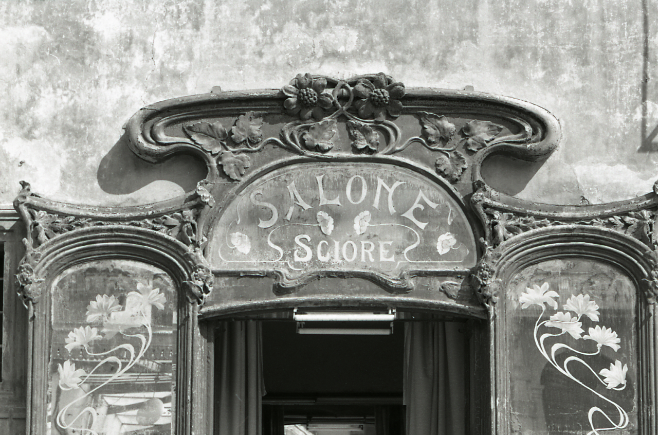 Servizio fotografico : Sulmona, 1969 / Paolo Monti. - Strisce: 7, Fotogrammi complessivi: 37 : Negativo b/n, gelatina bromuro d'argento/ pellicola ; 35 mm. - ((I fotogrammi hanno una doppia numerazione. . - Sul portanegativi: Nikon FP4. - Sul dorso del portanegativi Monti specifica: "Abruzzo.Barbiere Liberty. 23/32 Difettose.". - Occasione: Documentazione per la pubblicazione: "TOURING CLUB ITALIANO, Abruzzo e Molise, Milano, TCI, 1970". - Fonte: Agenda di Paolo Monti: Monti/ 3 aprile 1966 - 9 marzo 1971/ 12421-16823 (1966-1971), presso Archivio Paolo Monti. - Fonte: Monografia: TOURING CLUB ITALIANO, Abruzzo e Molise, Milano, TCI, 1970 (1970)